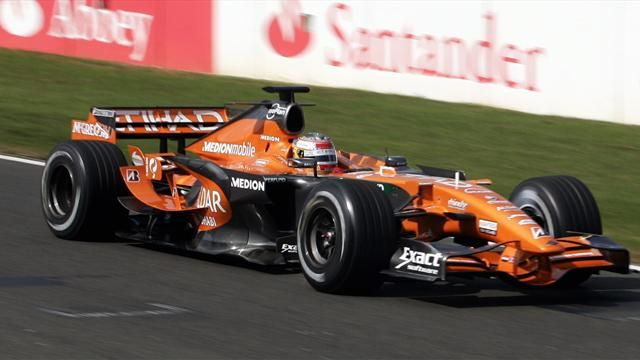 Roldán Rodríguez probando un Skyper F1 en 2007.